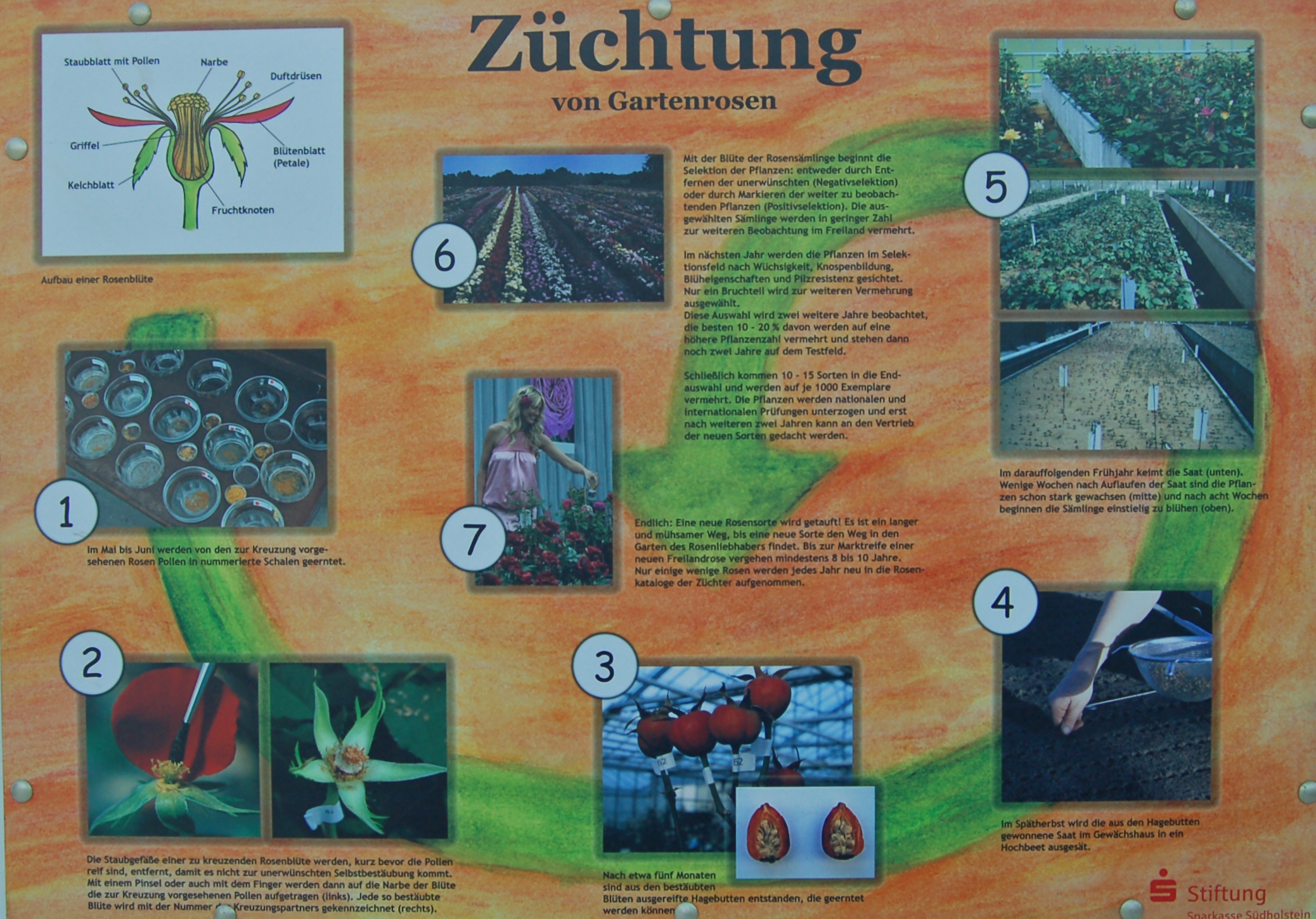 Infoschild Züchtung von Gartenrosen im Rosarium Uetersen